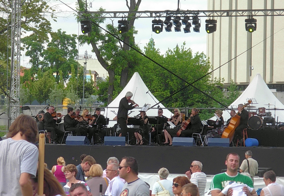 Bydgoski Festiwal Wodny - koncert orkiestry Symfoników Bydgoskich